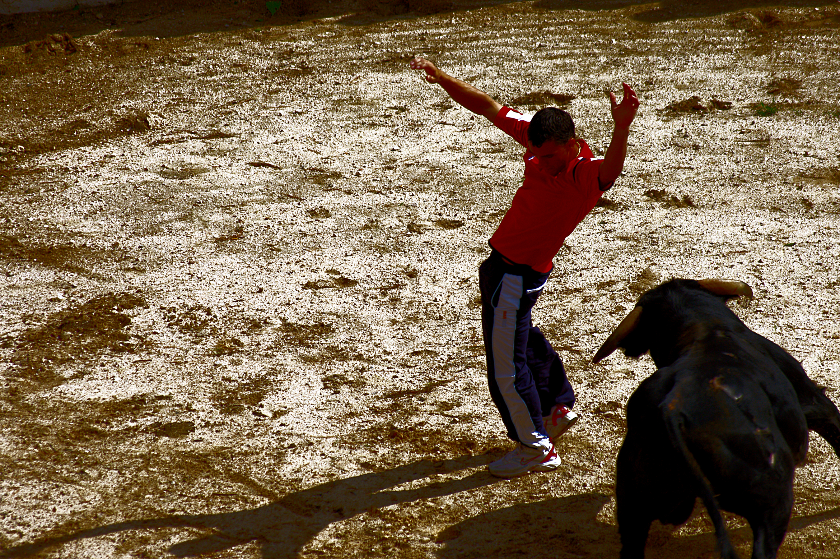 Recortador. Fiestas de septiembre de Villaverde de Guadalimar (Albacete). 2007.